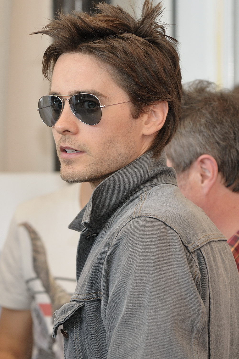 66ème Festival du Cinéma de Venise (Mostra), 10ème jour (11/09/2009) Photocall avec Jared Leto, Diane Kruger, Sarah Polley et le réalisateur Jaco Van Dormel pour le film : MR. NOBODY